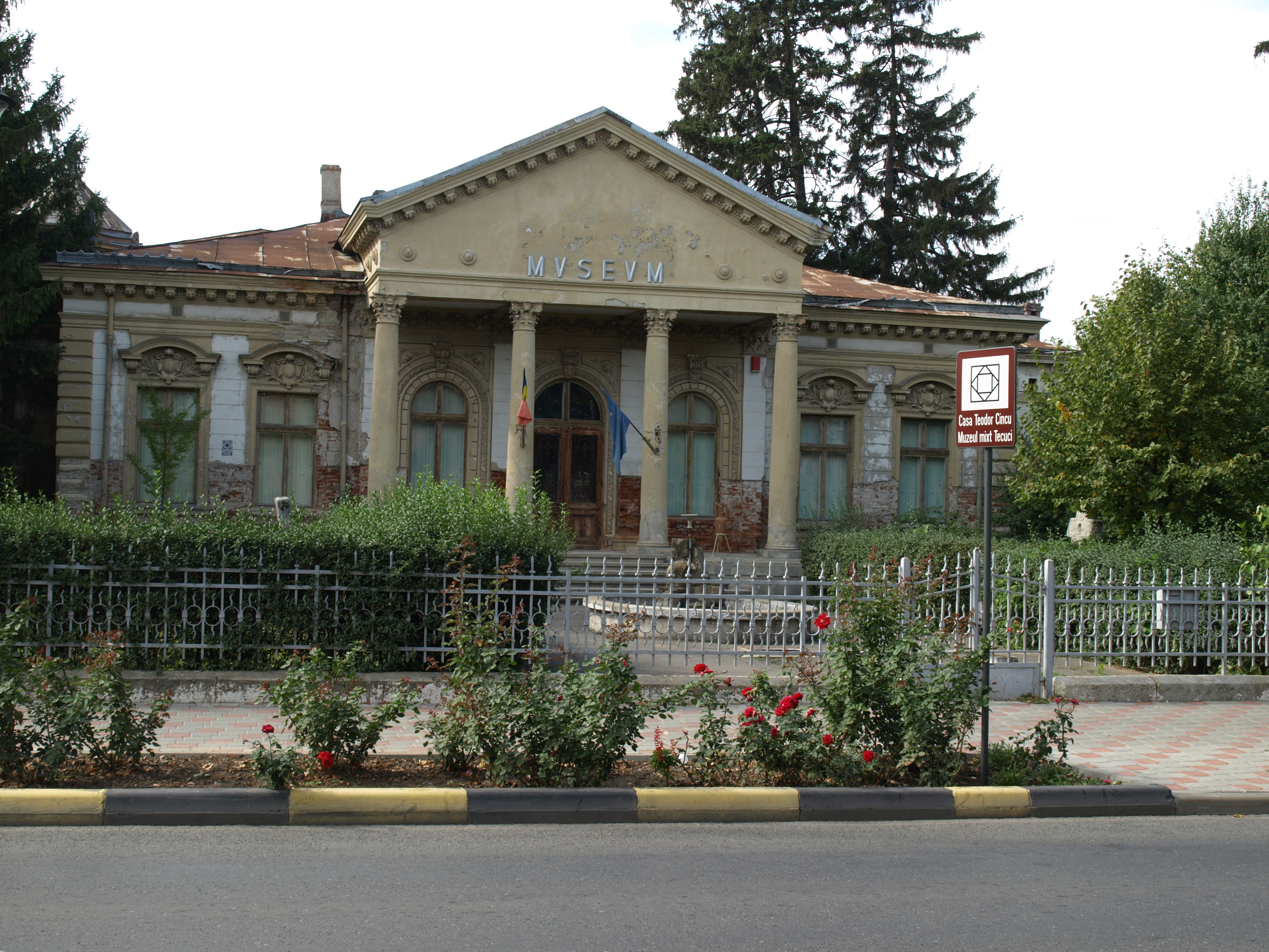 Casa Teodor Cincu, azi Muzeul Mixt Tecuci